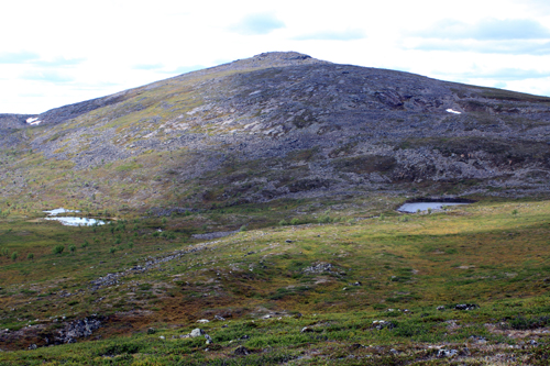 Koarvikodds-tunturi (Kuárvikozzâ) Inarissa koillisesta kuvattuna